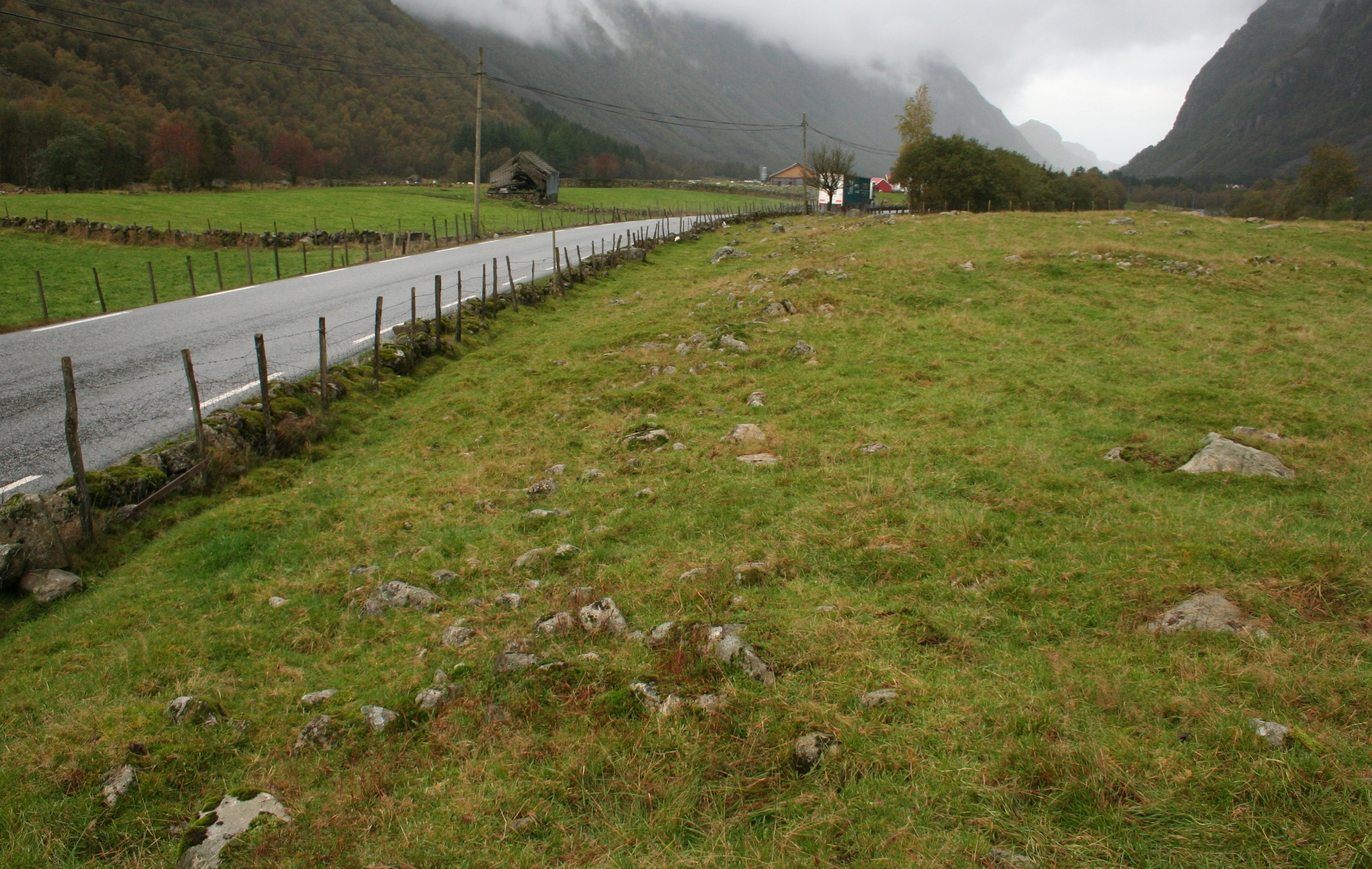 Steinstreng, utgardsgjerde på ødegård fra folkevandringstid, Gilja, Dirdal, Rogaland